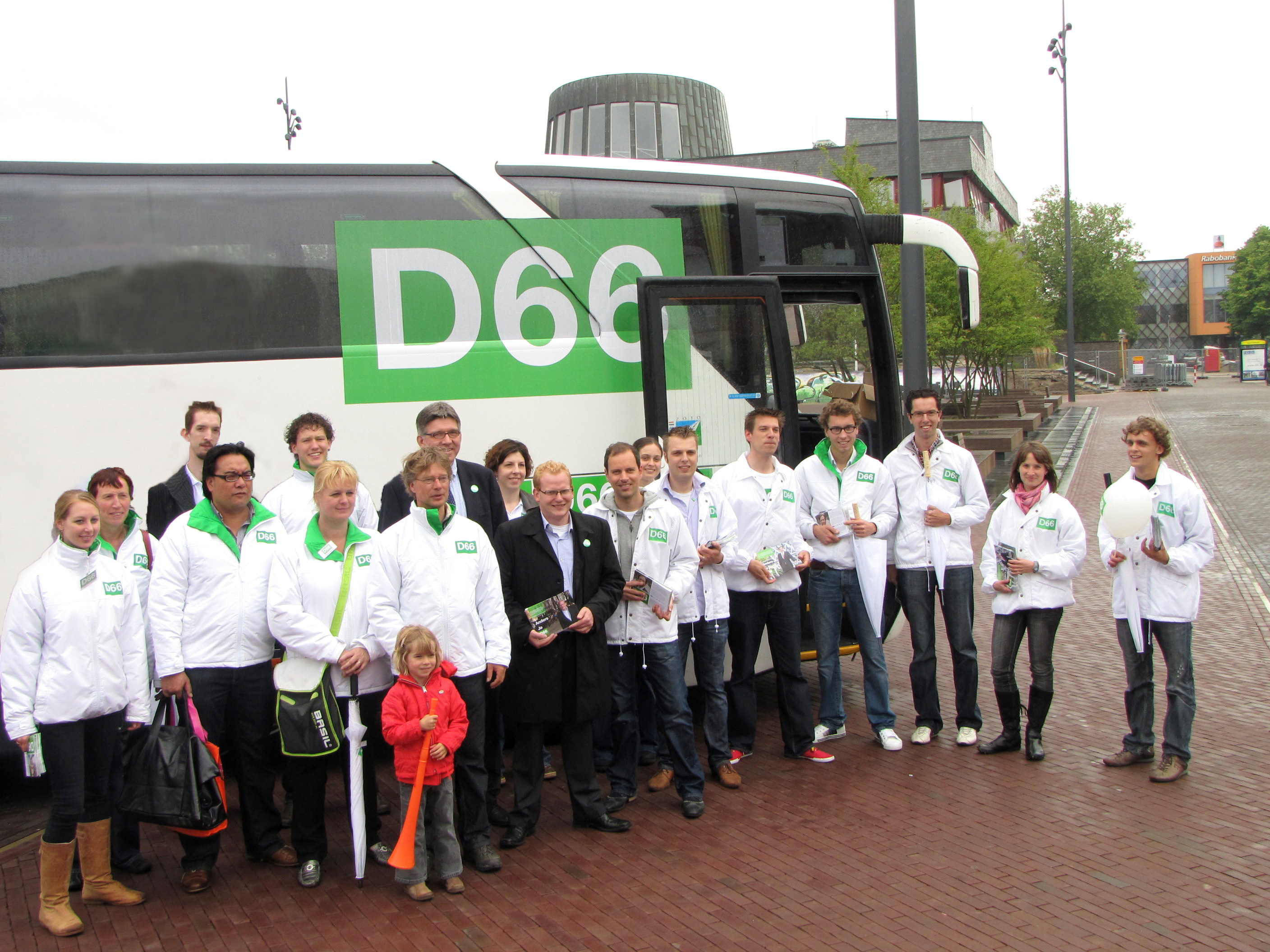 Bus van Democraten 66 in Doetinchem, campagne voor de kamerverkiezingen 2010.